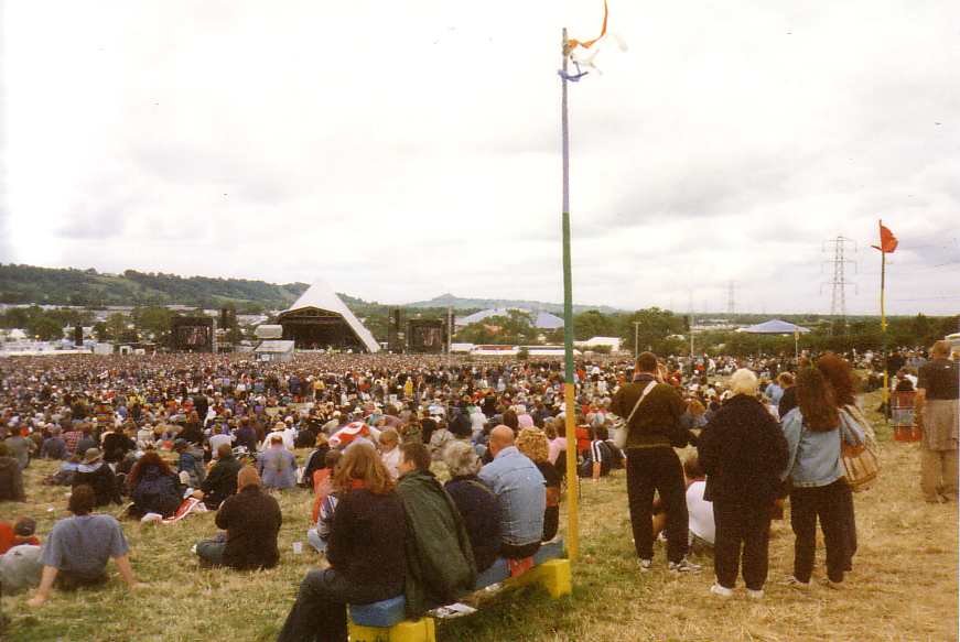 Pyramid Stage